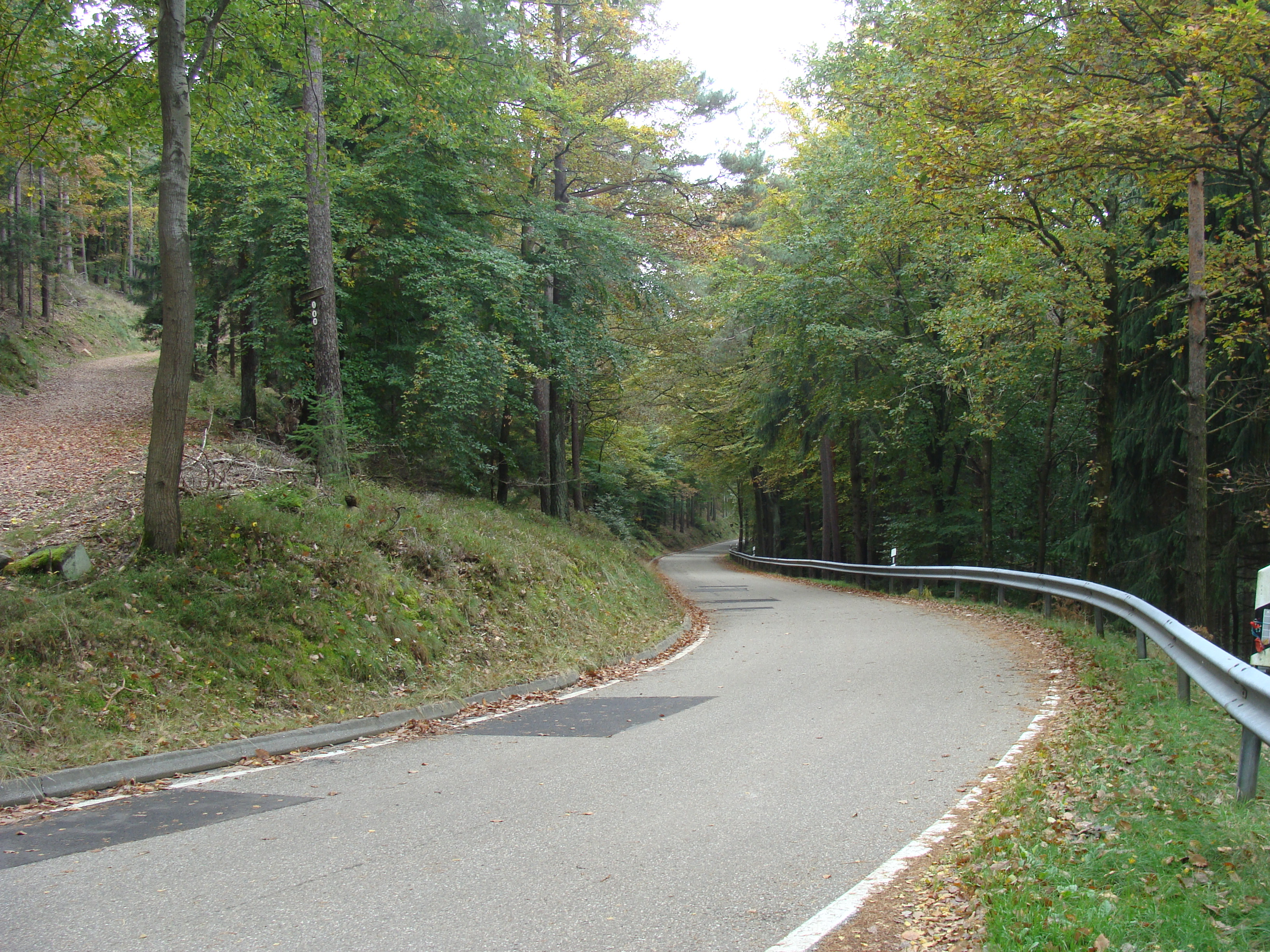 Kalmithöhenstrasse am hahnenschritt in Richtung Hüttenhohl